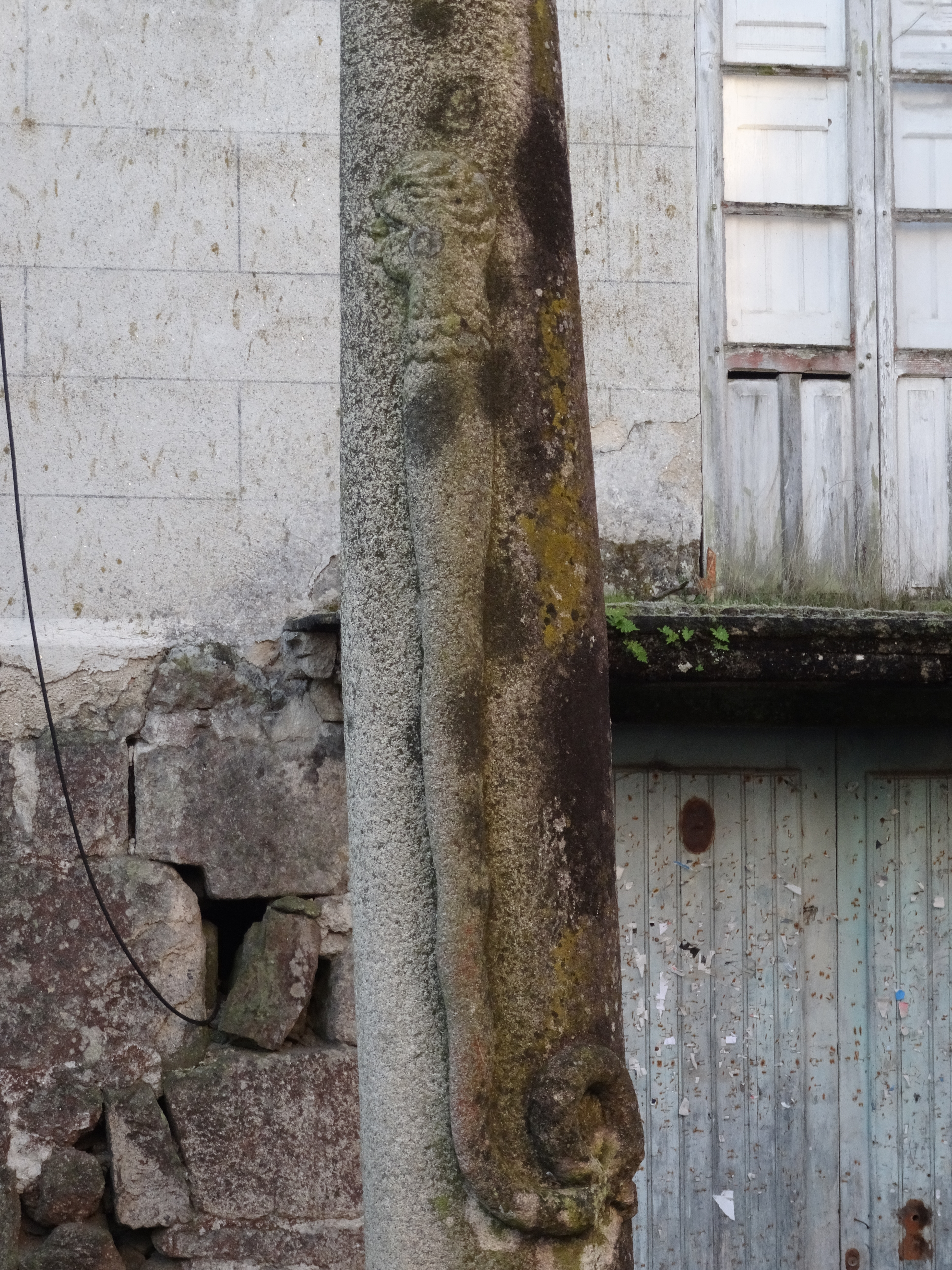 Ver título.